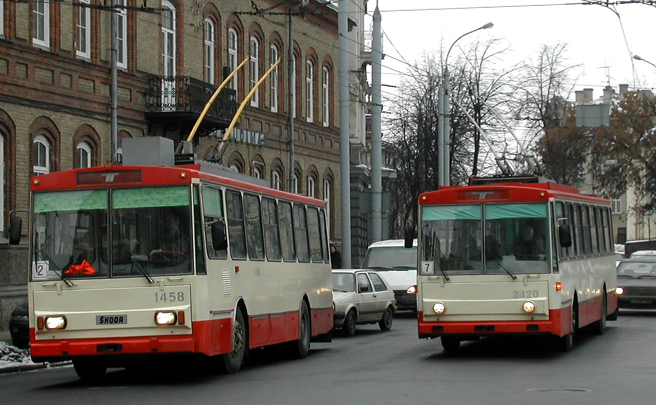 Skoda trolleybus in Vilnius